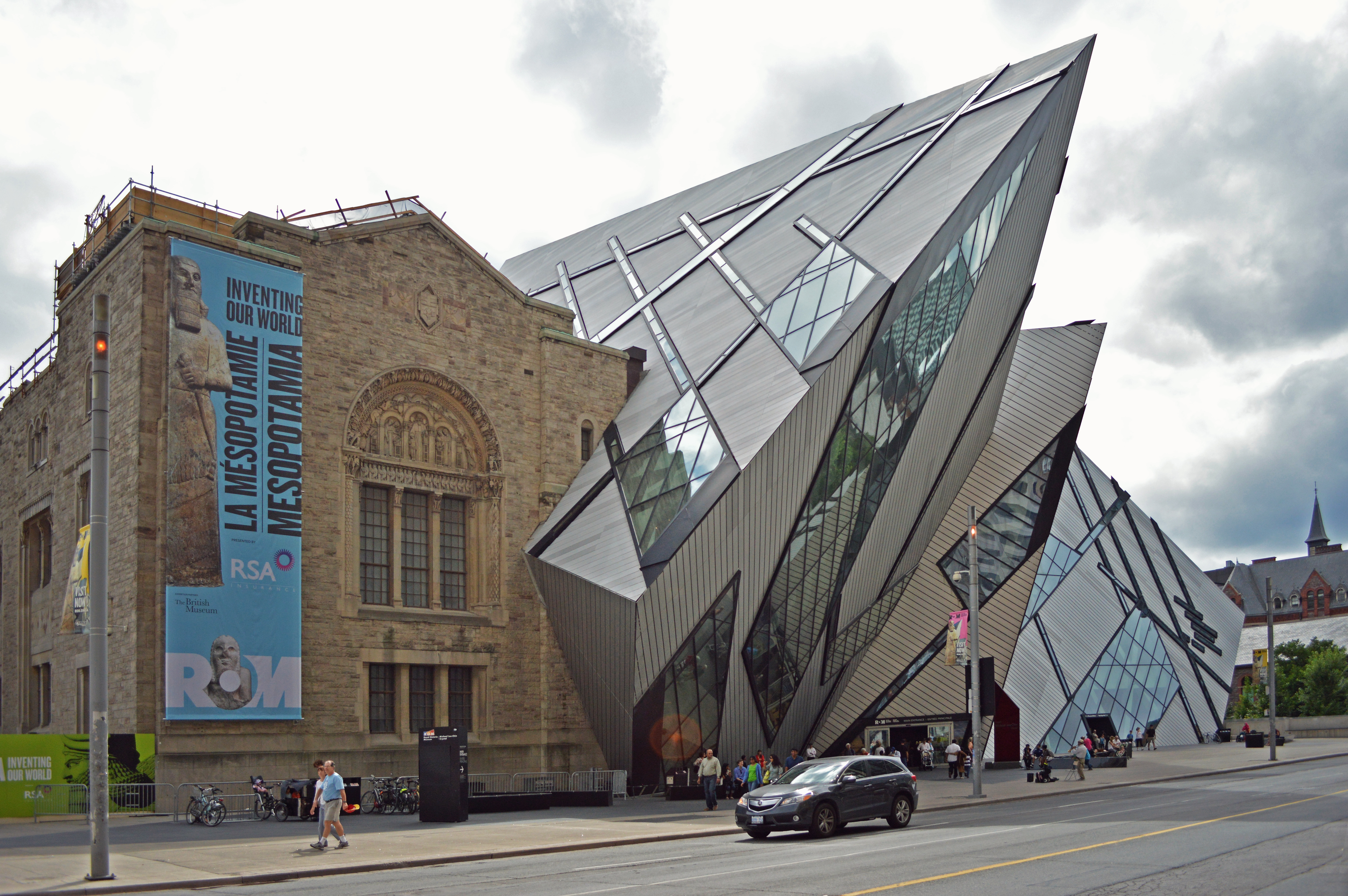 ROM - Royal Ontario Museum, Toronto, Ontario, Canada